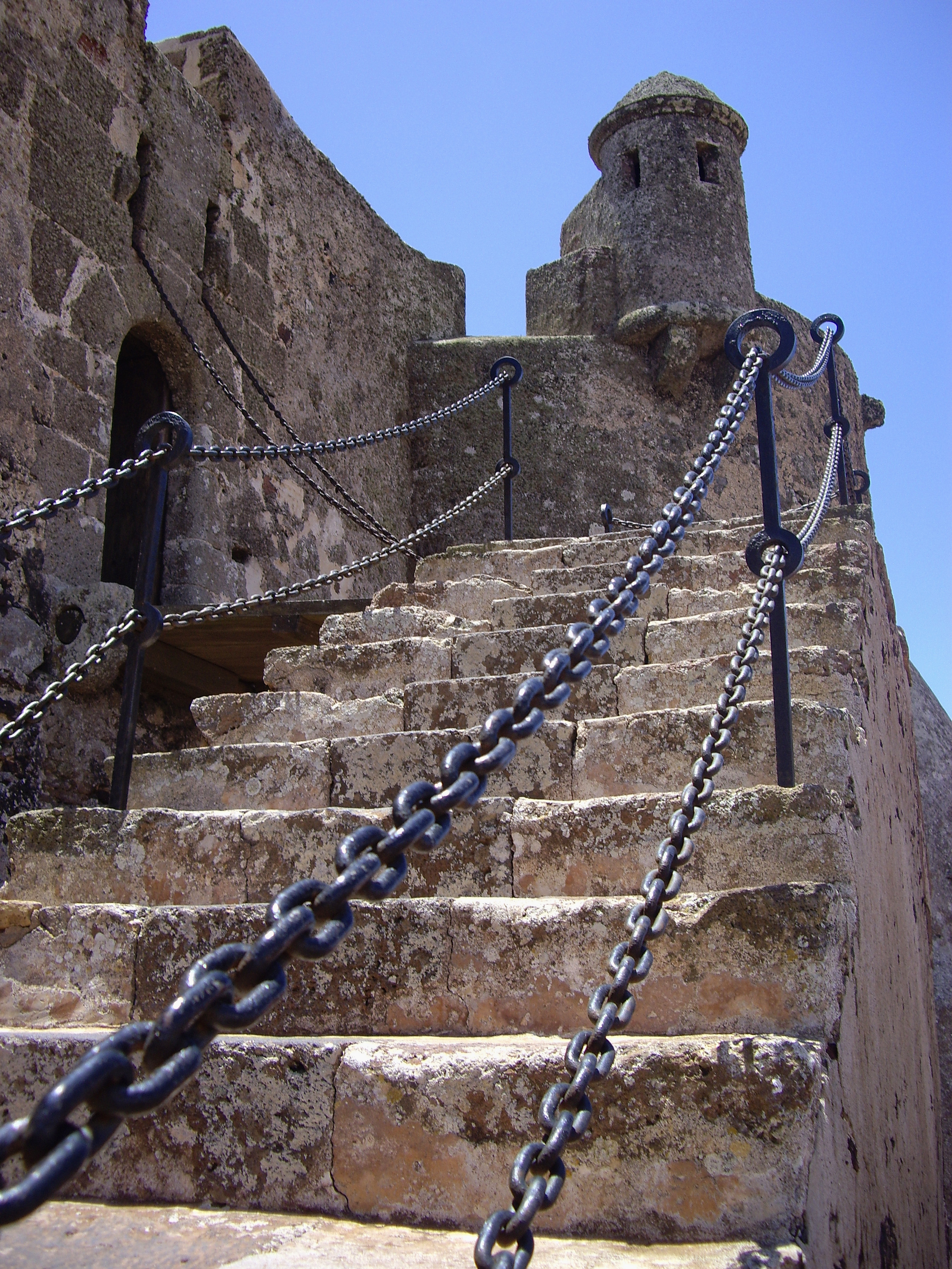 Escalera de entrada al Castillo de Santa Bárbara-Teguise-Lanzarote